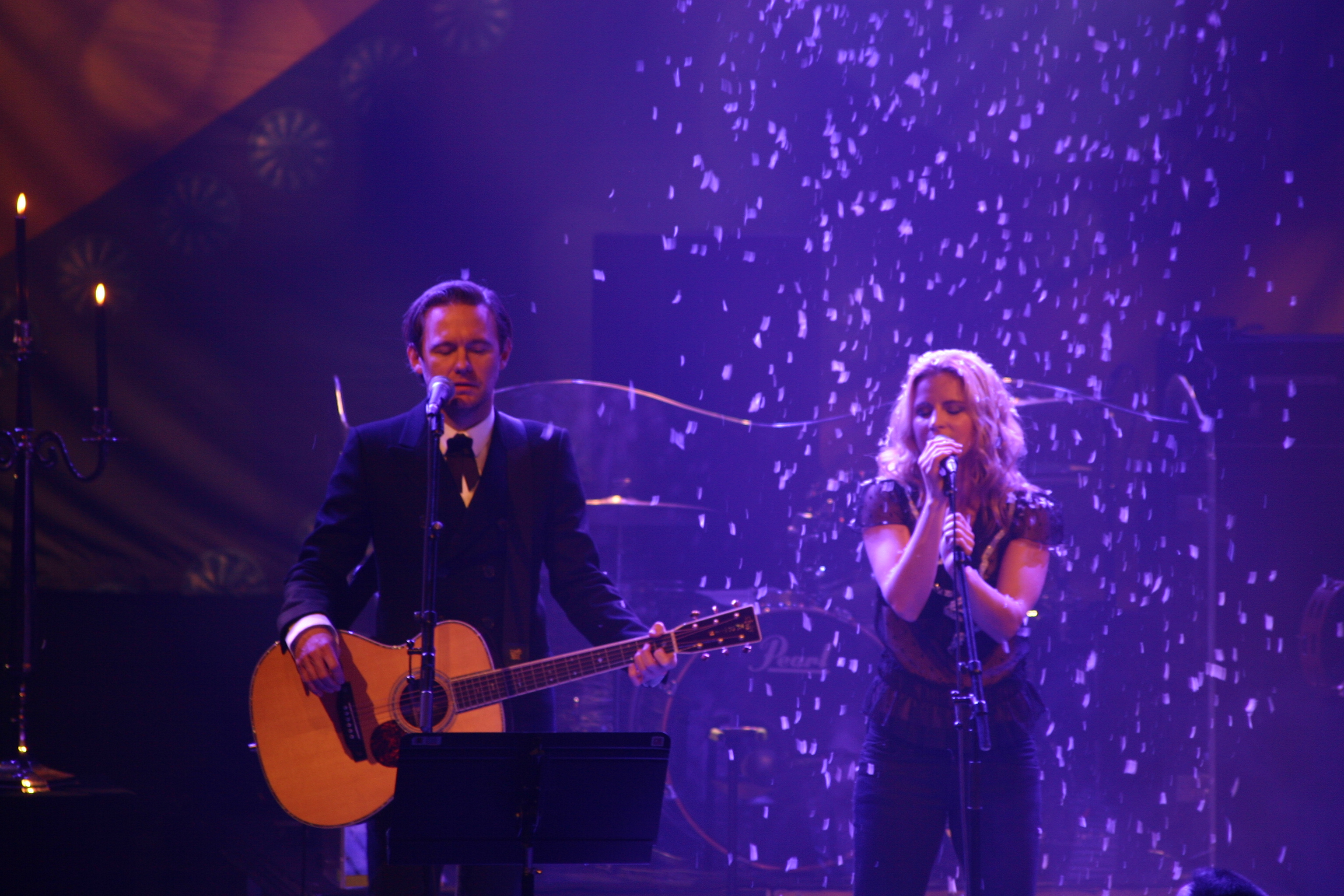 Lisa Miskovsky with Jocke Berg of Kent at Cirkus in Stockholm.